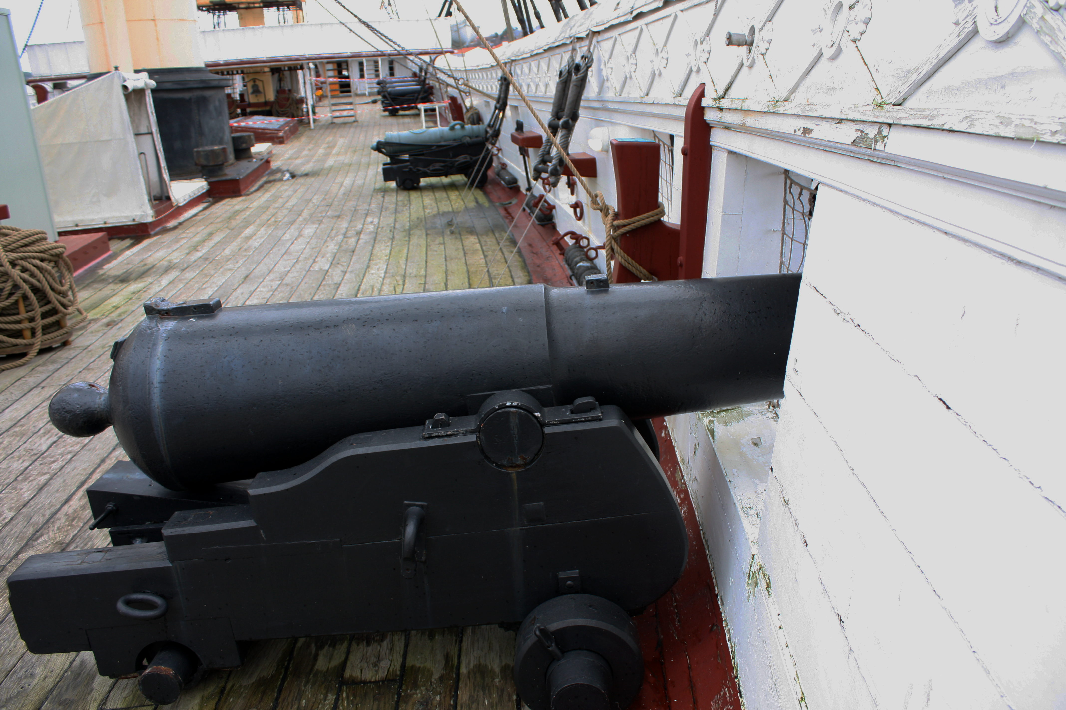 Oberdeck der Fregatte Jylland (1856)